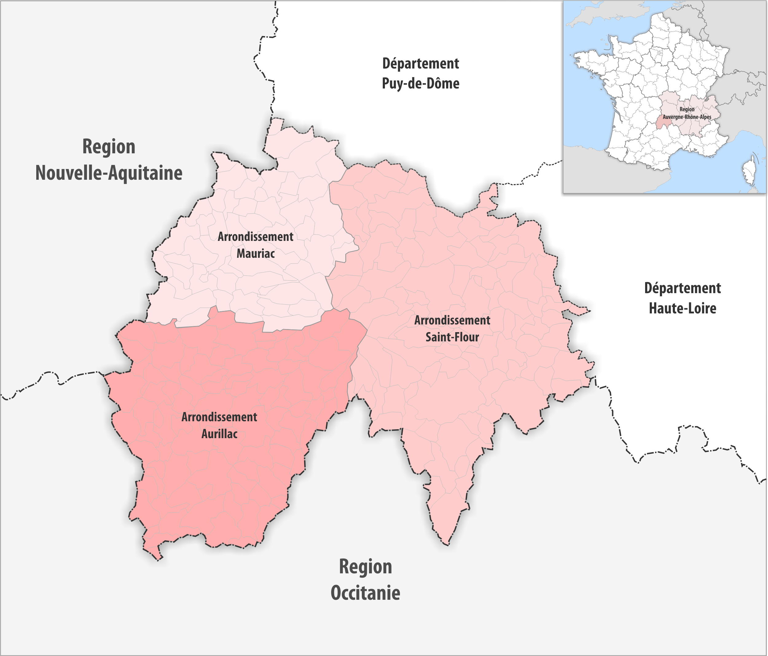 Gemeinden und Arrondissemente im Departement Cantal